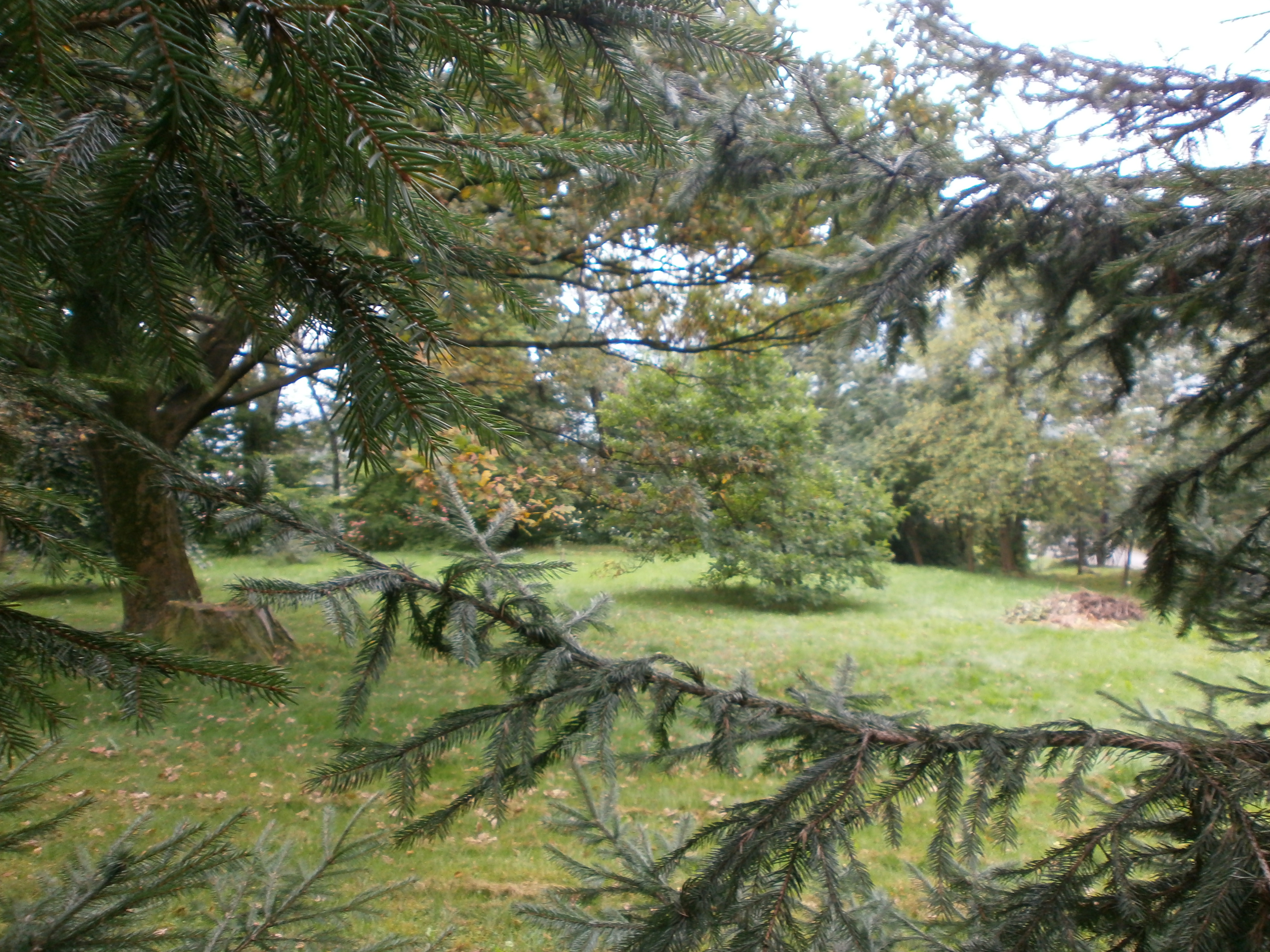 Tymbark, park, XIX/XX